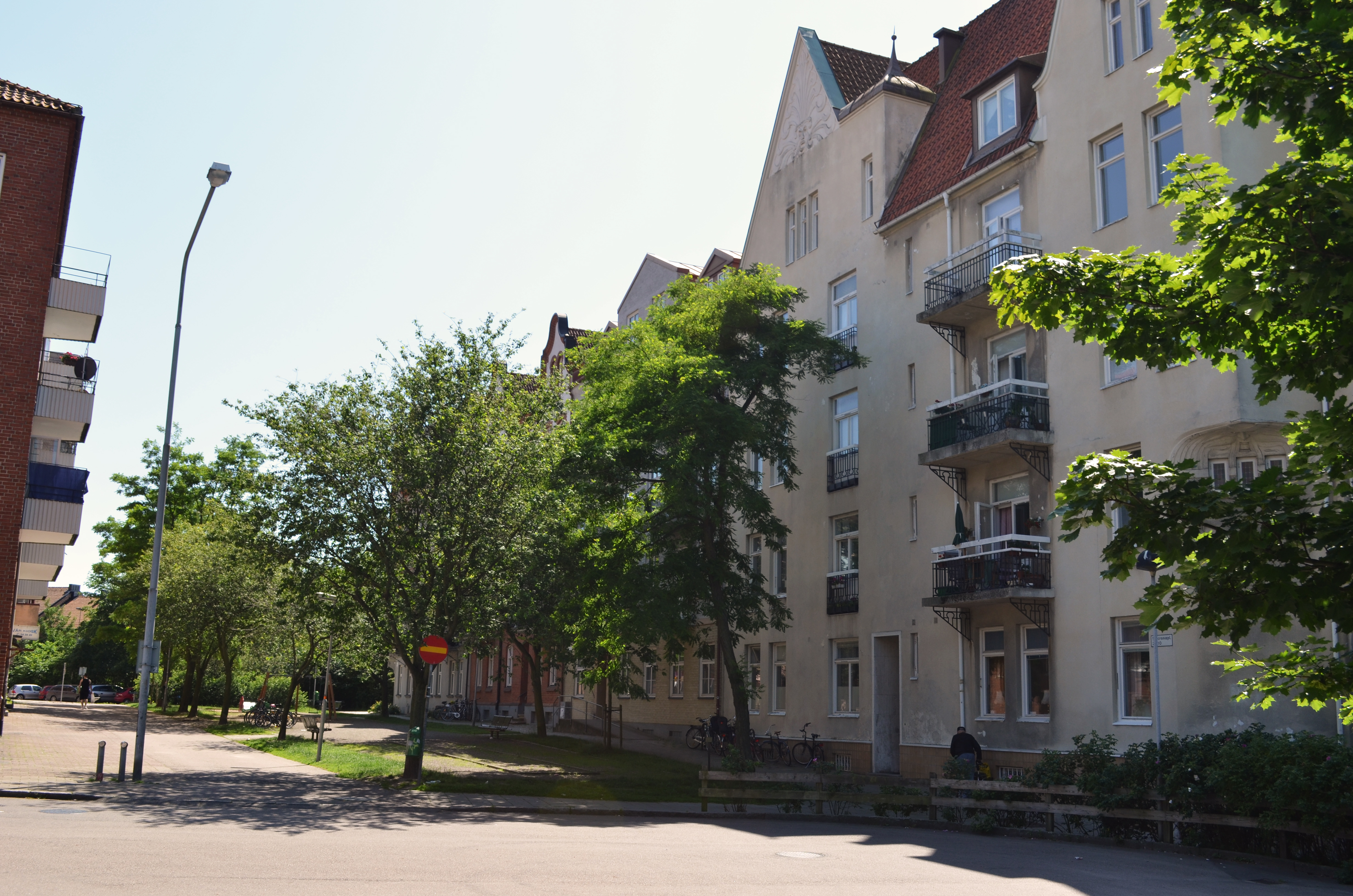 Siöcronaplatsen på Eneborg i Helsingborg.